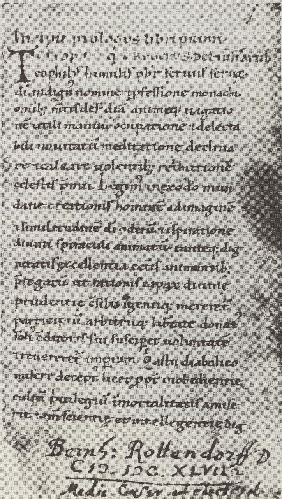 Le Schedula diversarum artium est le premier ouvrage du genre à traiter des arts visuels.